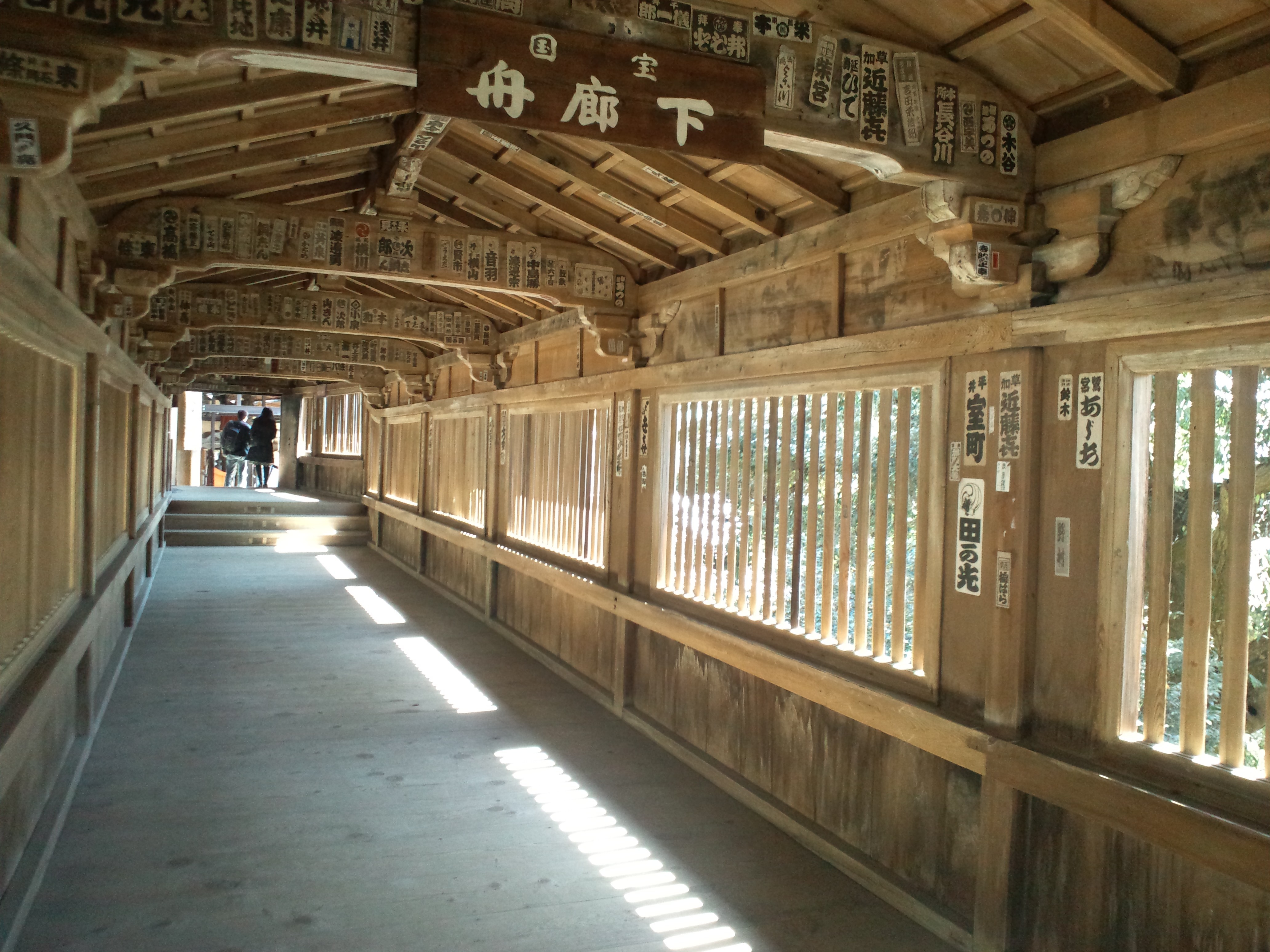 宝厳寺 舟廊下